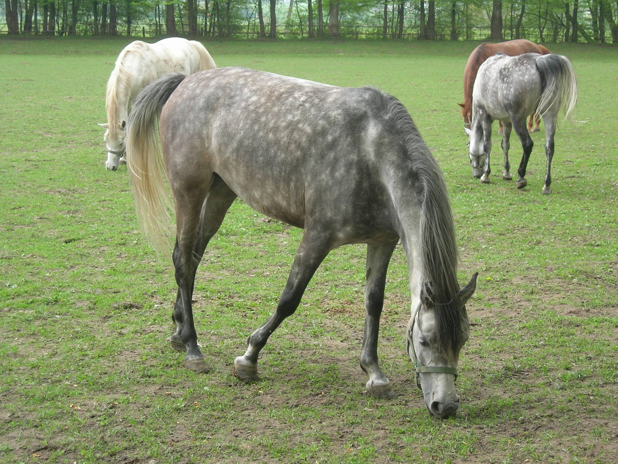 stadnina koni w Janowie Podlaskim